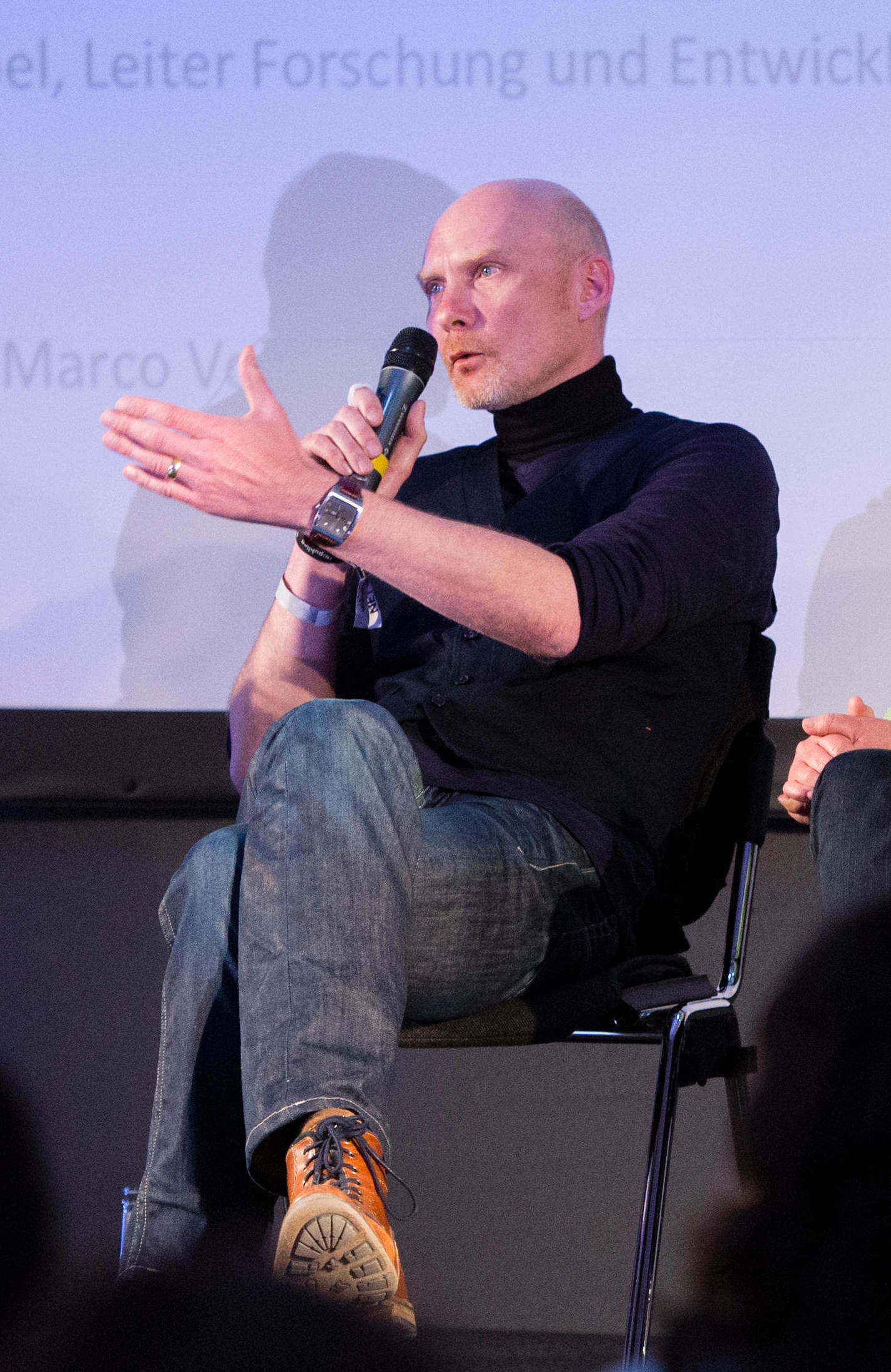 Nadine Kuhla von Bergmann, Marco Vollmar, Christian Appel und Stephan Rammler zum Thema "Dezentral, vernetzt und nachhaltig - Ideen für eine bessere Klimawelt" am 02.05.2016 auf der re:publica in Berlin.